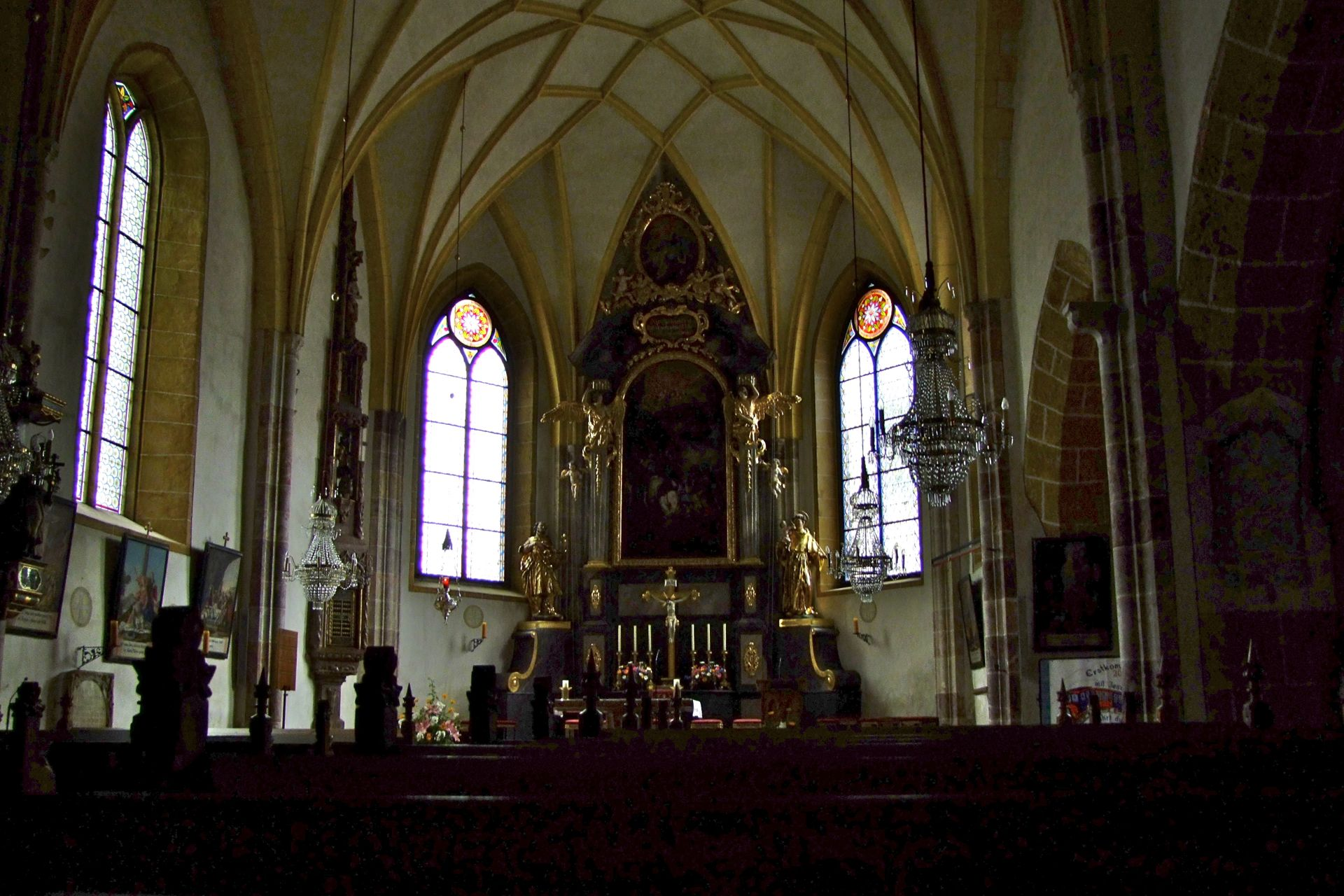 Kath. Pfarrkirche Pauli Bekehrung mit ehem. Friedhof